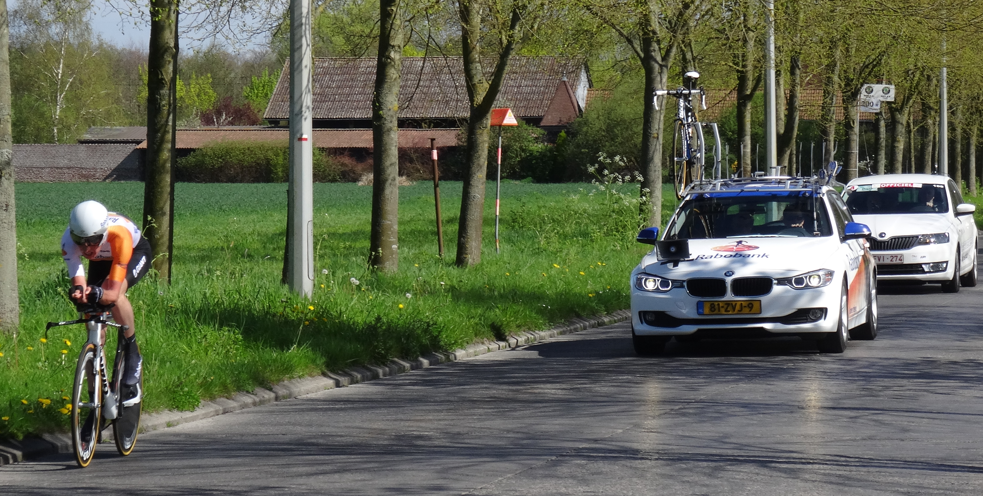 Triptyque des Monts et Châteaux 2014, étape 2a, 5 avril 2014, contre-la-montre individuel à Bernissart. Depicted team: Rabobank Development The creation of these files was made possible thanks to the organizers of the Triptyque des Monts et Châteaux 2014 English | français | +/−